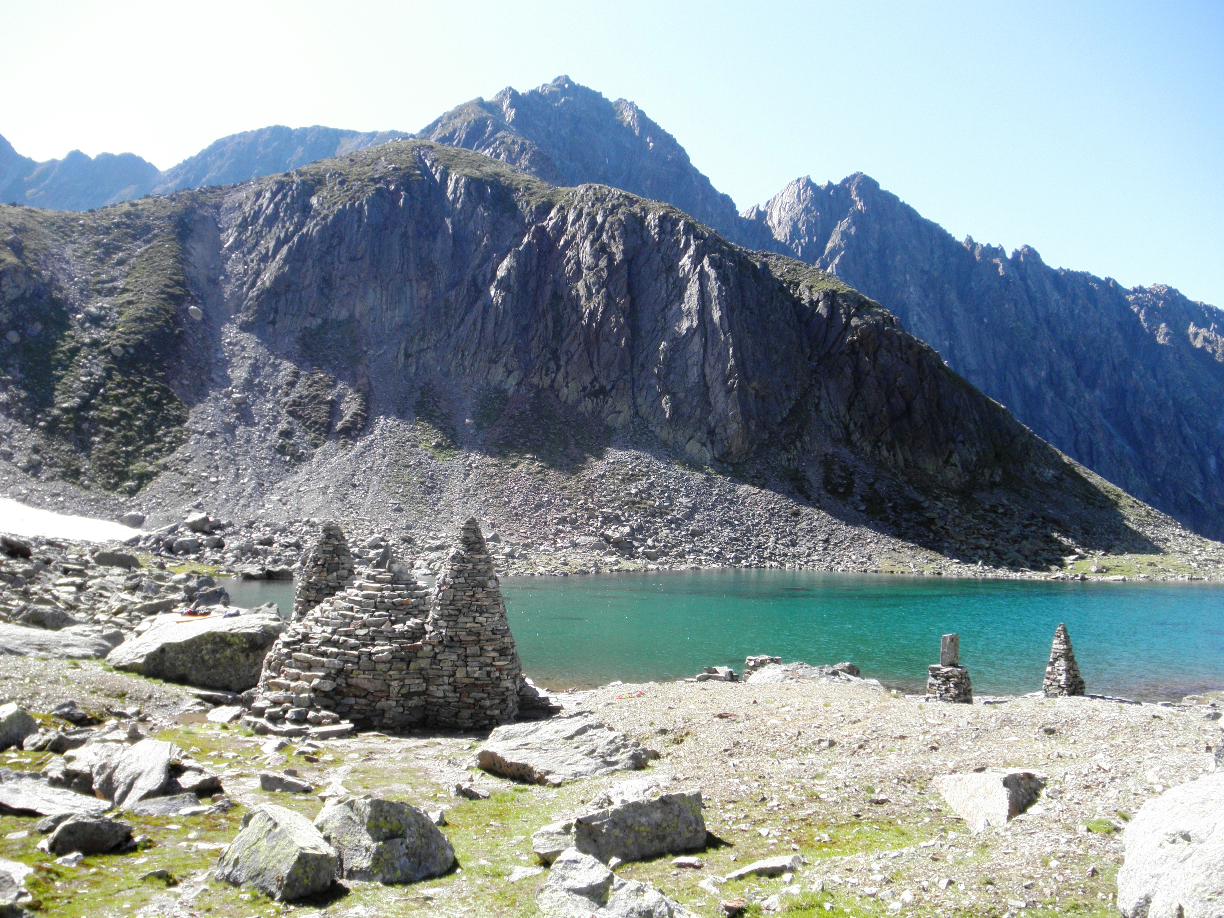 Seitenansicht des Apollontempels am Hundstalsee (Österreich) auf 2289 m über dem Meer.